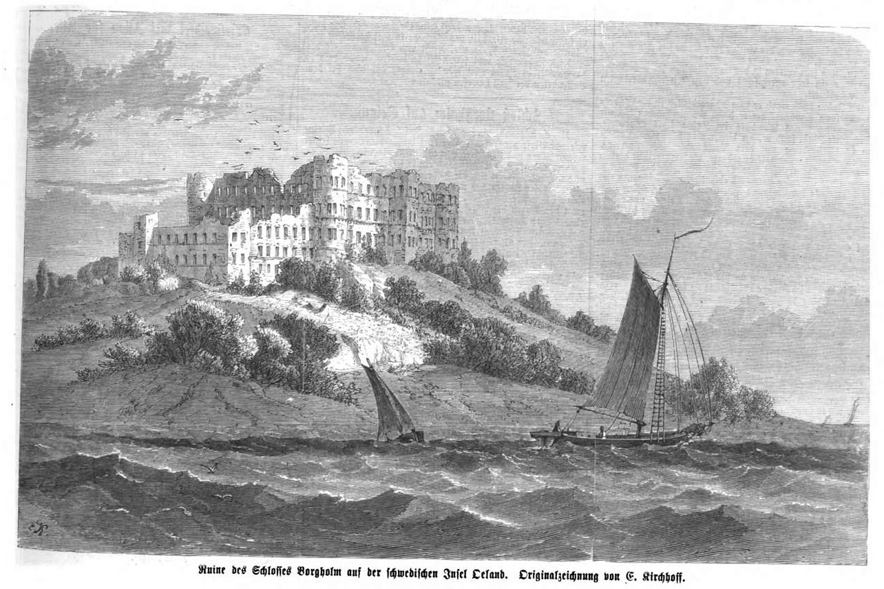 Schloss Borgholm auf der Insel Oeland (Schweden), gesehen von der Seeseite.